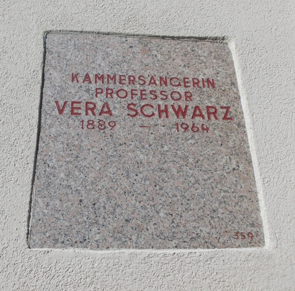 Vera Schwsrz-Feuerhalle Simmering (MH-359)